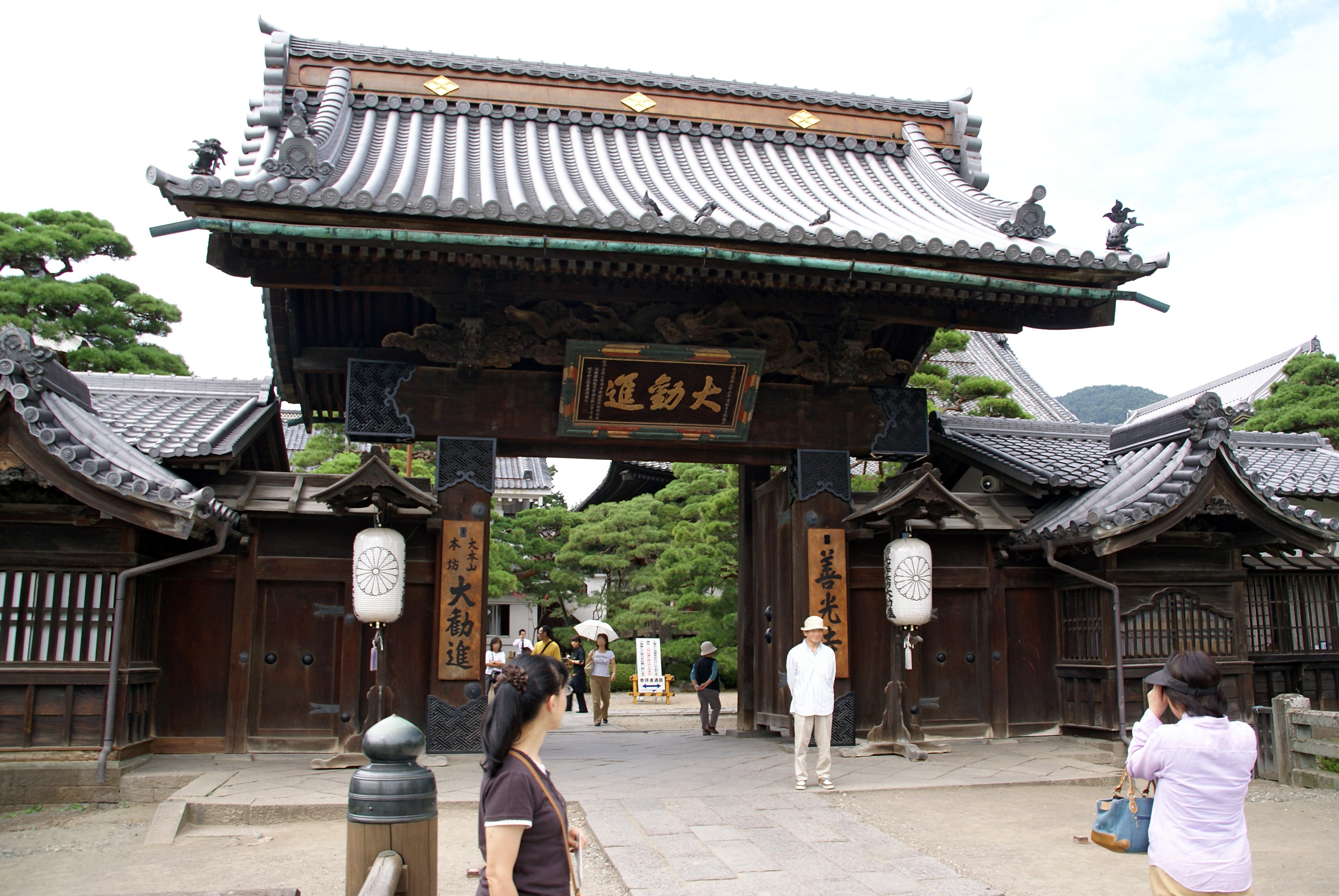 Zenkoji in Nagano, Nagano prefecture, Japan